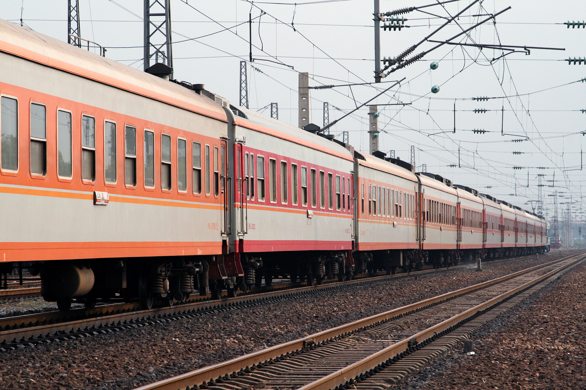 中国铁路25G型客车